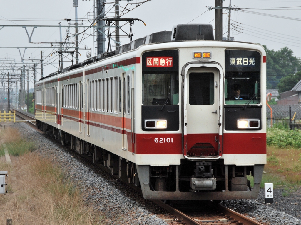 野岩鉄道6050系100番台電車62101編成・日光線「区間急行東武日光ゆき」4両（2009/6/5・家中にて撮影）